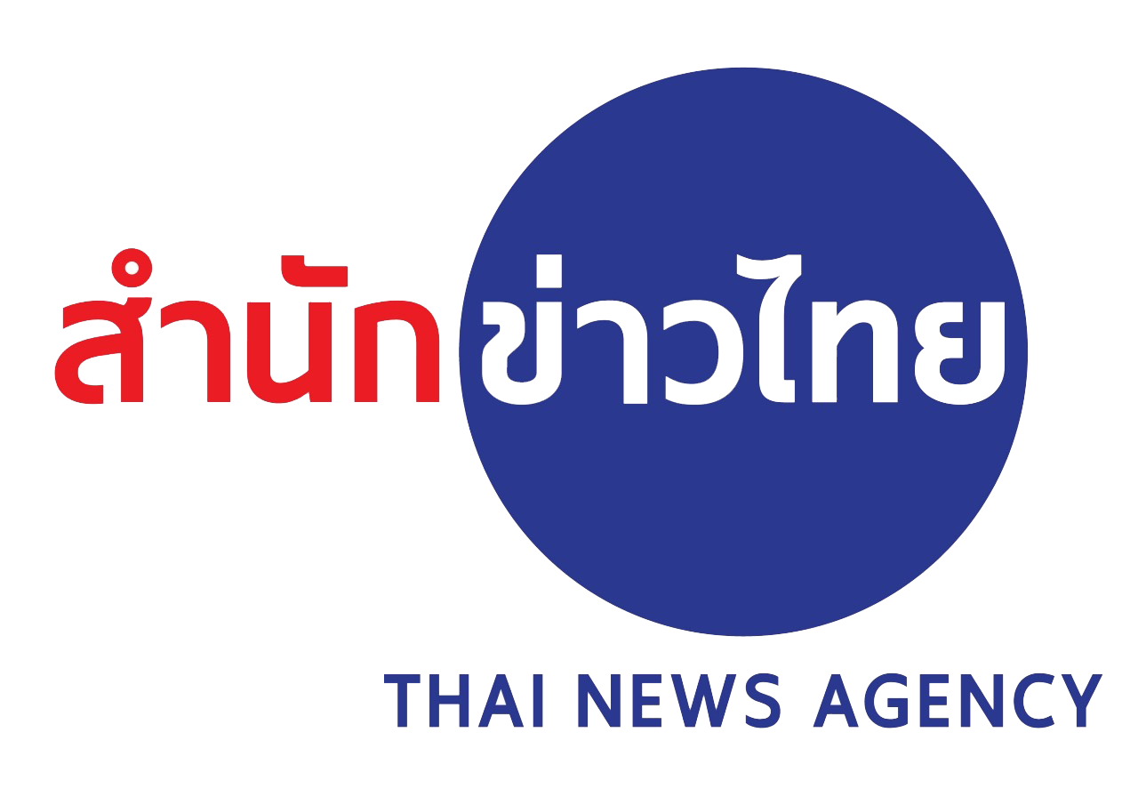 โลโก้สำนักข่าวไทย